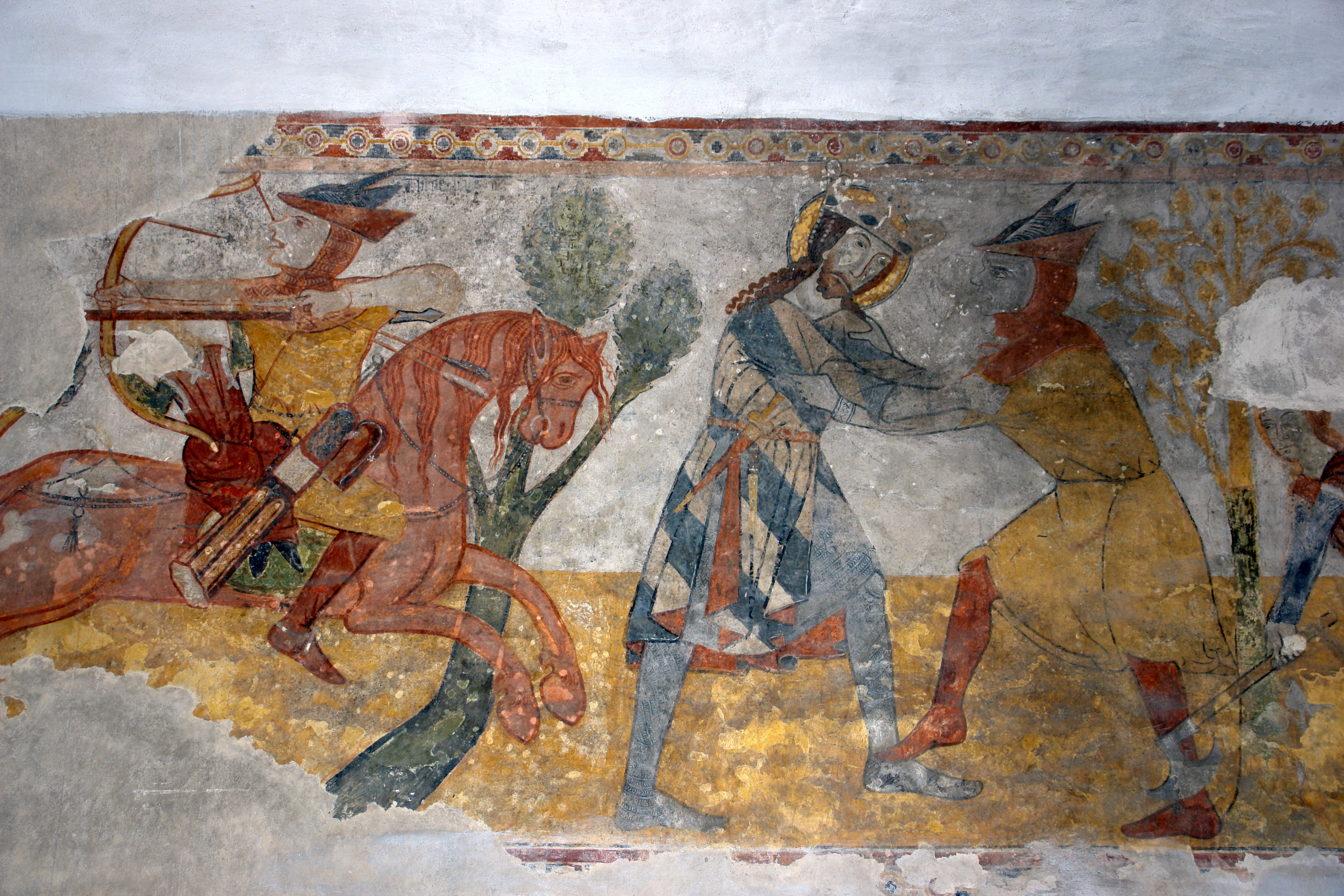 Nagylomnic-Kakaslomnic (Velka Lomnica) Szent László freskó